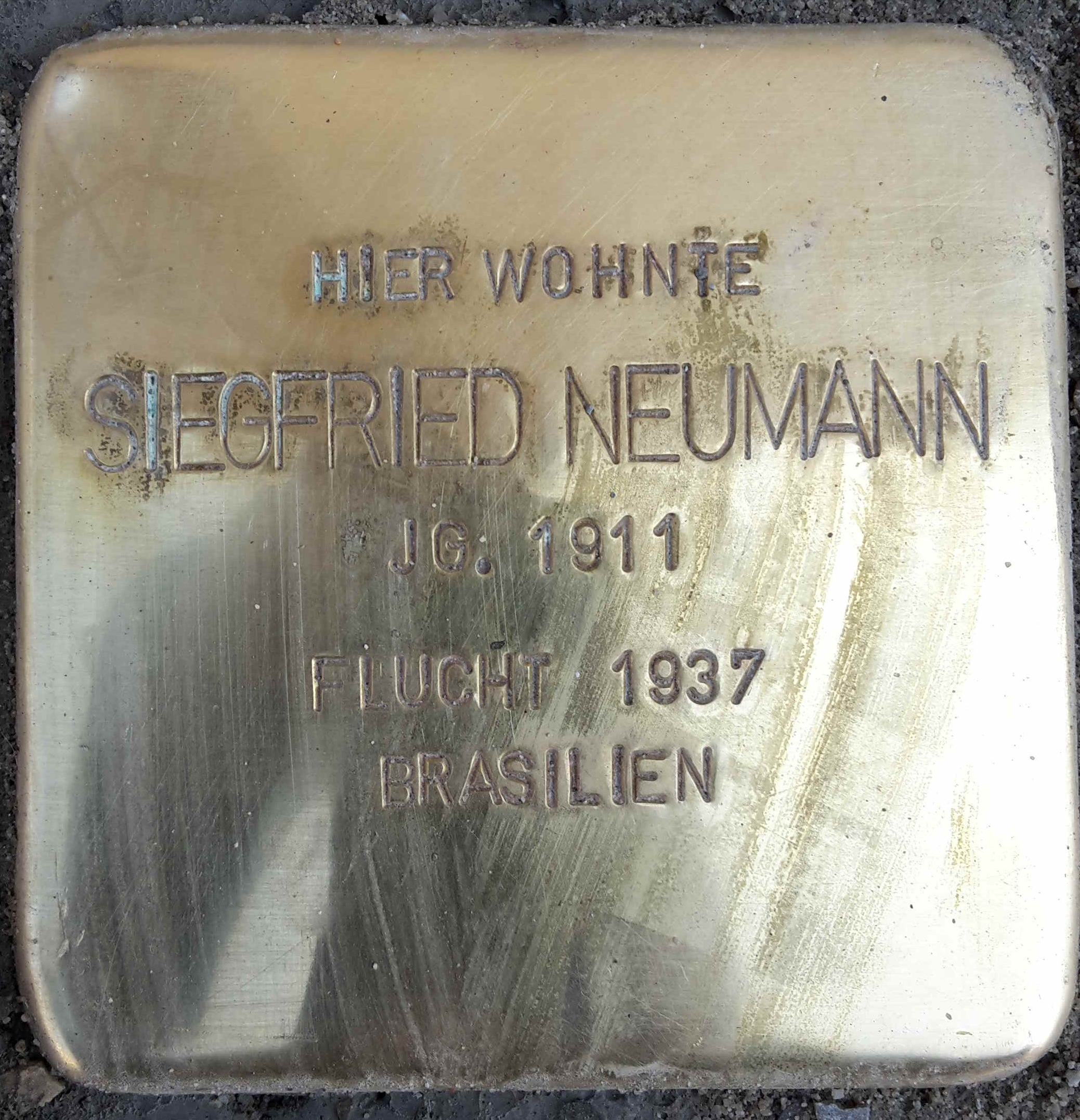 Stolperstein für Siegfried Neumann in Neu-Ulm